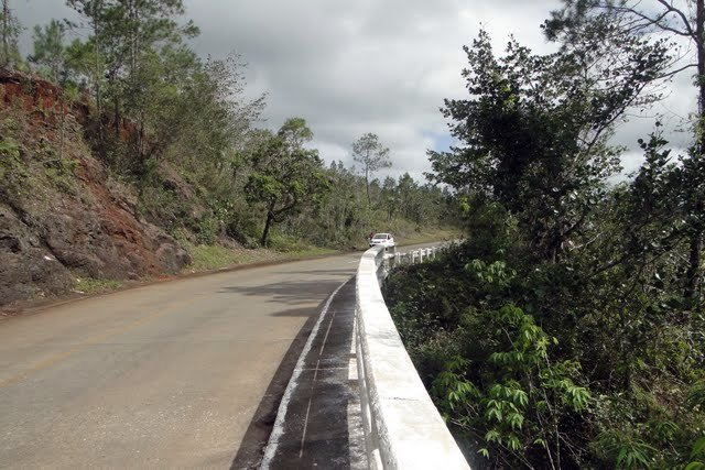 Farola Strasse nicht weit von Baracoa